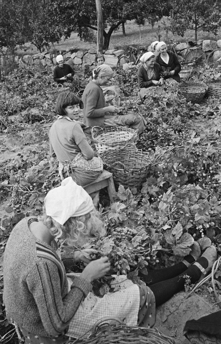 Skåne. Humleplockning i Vångatrakten. Foto Gunnar Lundh 1937.